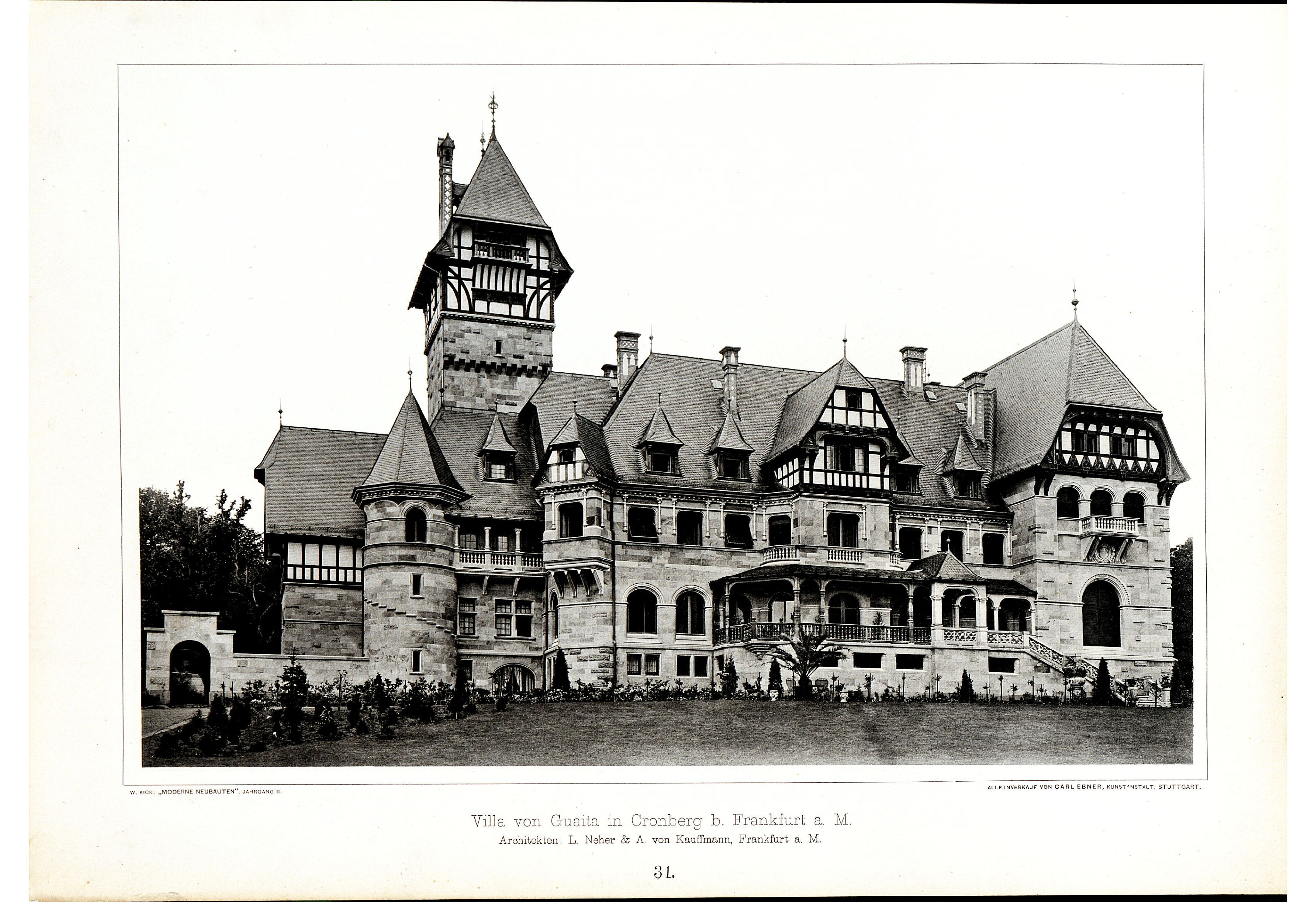 Villa von Guaita in Cronberg bei Frankfurt. Architekten: L. Nehe und A. von Kauffmann, Frankfurt, Tafel 31, Wilhelm Kick, Jahrgang II